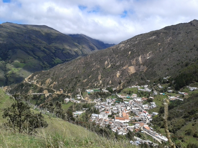 Esta fotografía fue tomada en el municipio colombiano con código 68867.